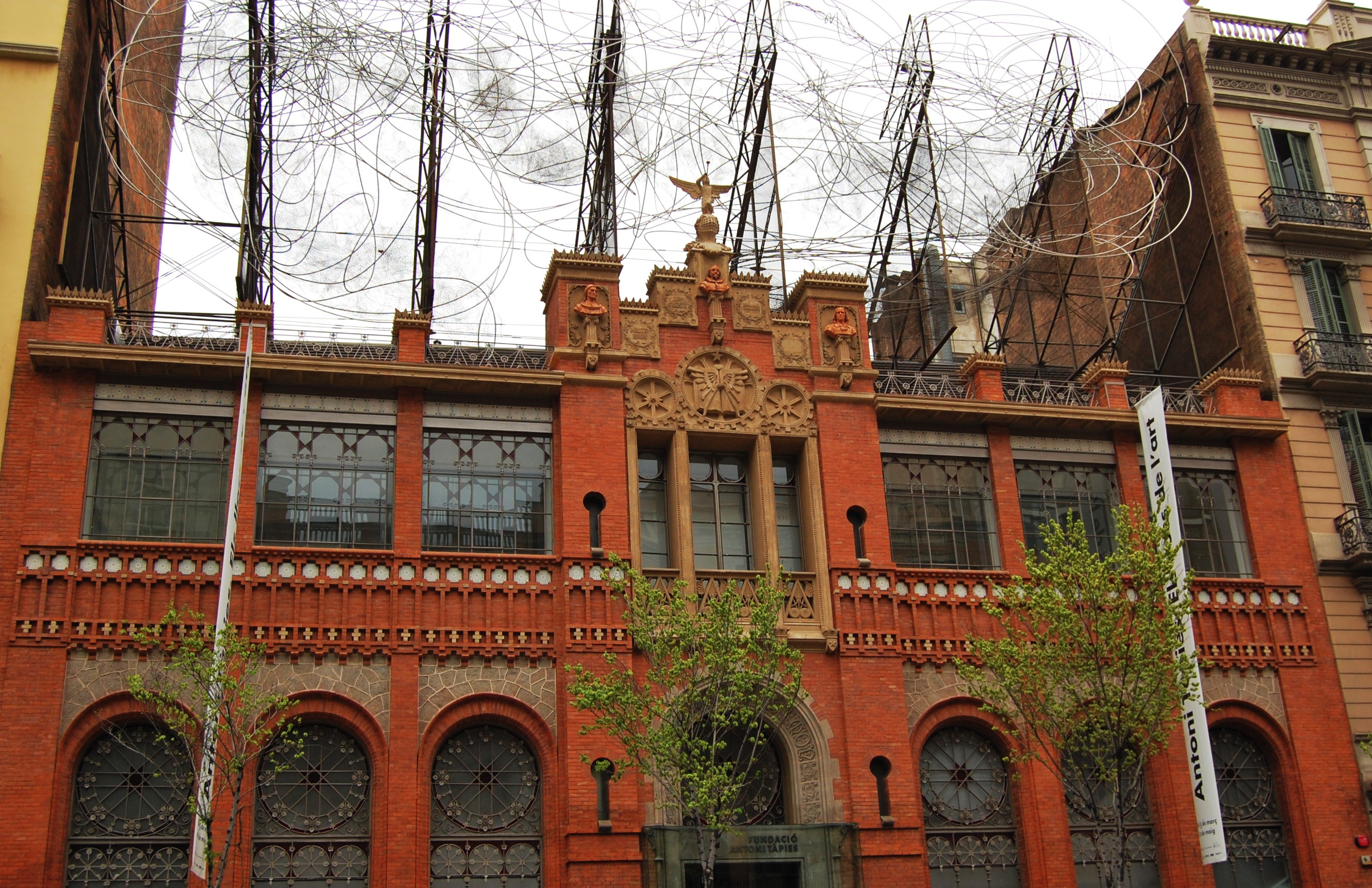 Fundació Tàpies (Barcelona)